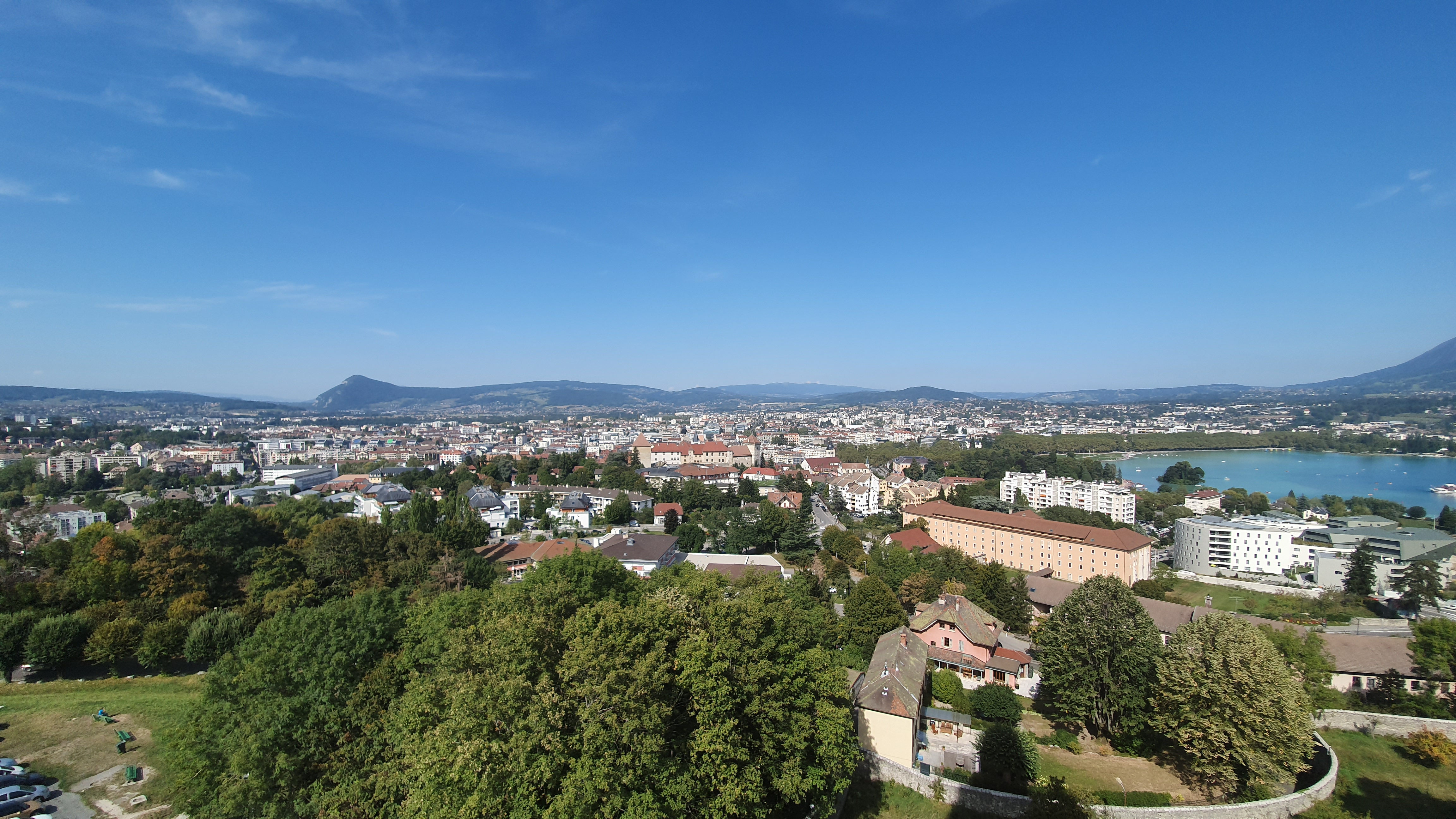 Vue d'ensemble du centre-ville d'Annecy